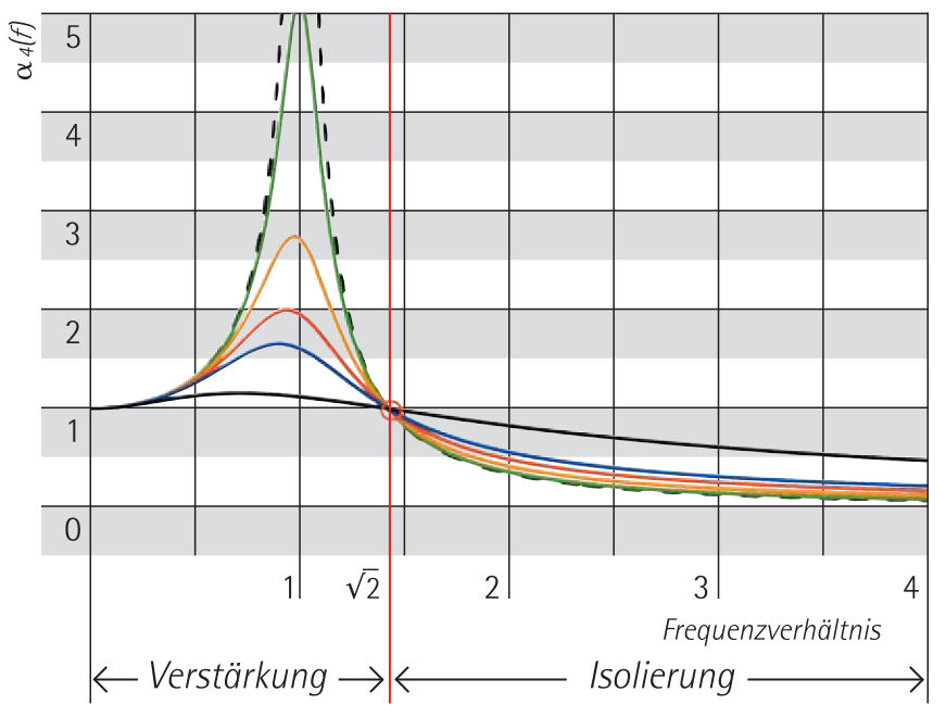 Amplitudenfrequenzgang